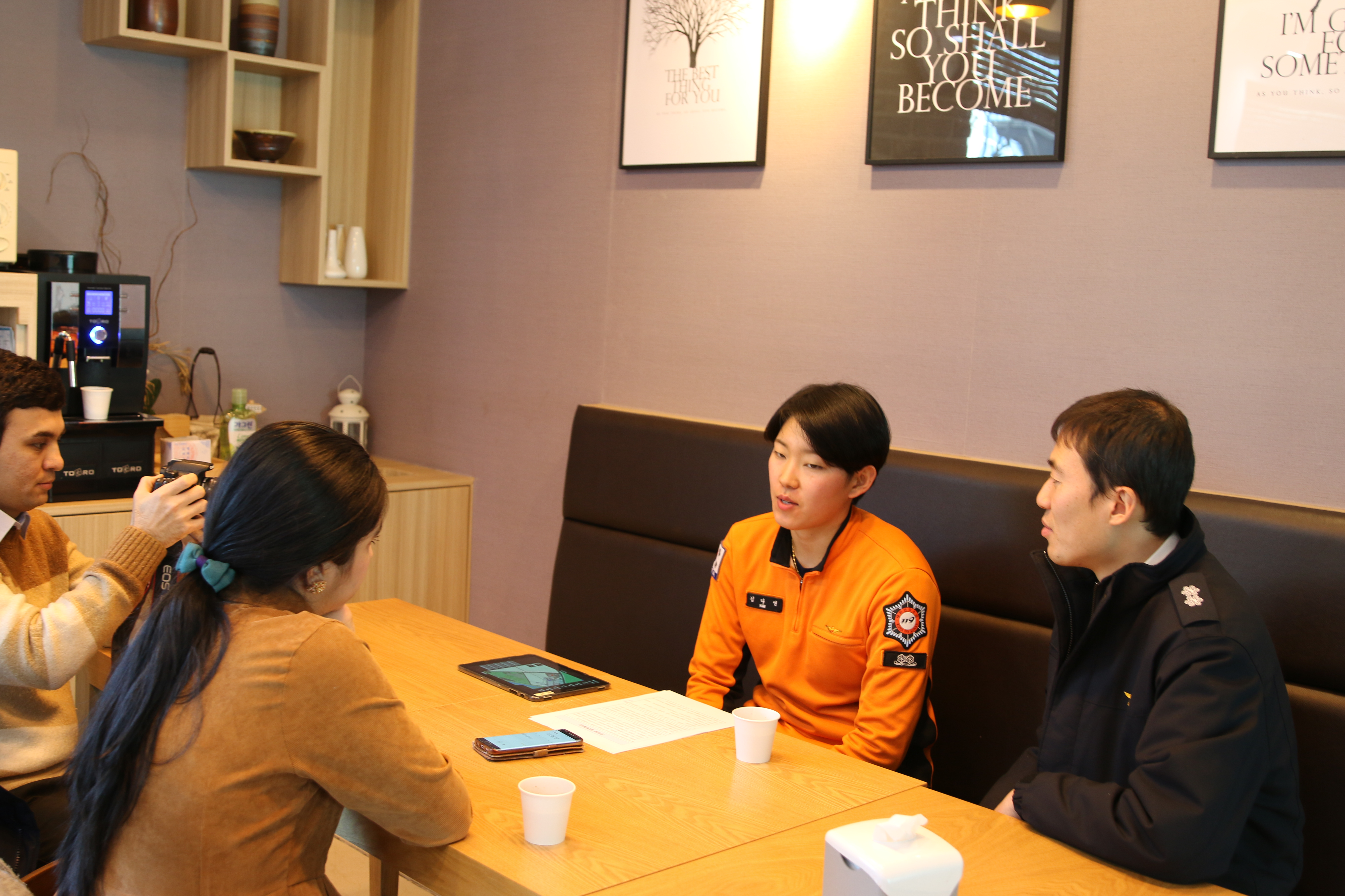 2020년 우즈베키스탄 kun.uz 기자 Feruza Avazova Alisherovna가 횡성소방서를 방문하여 통역 최광모 배석하에 소방관 김다연을 인터뷰하고 있다.Oʻzbekcha/ўзбекча: "Kun.uz"ning Janubiy Koreyadagi muxbiri Feruza Avazova Alisherovna Hoengseong Yong'inga qarshi kurashish markazi o't o'chiruvchilaridan intervyu oldi.